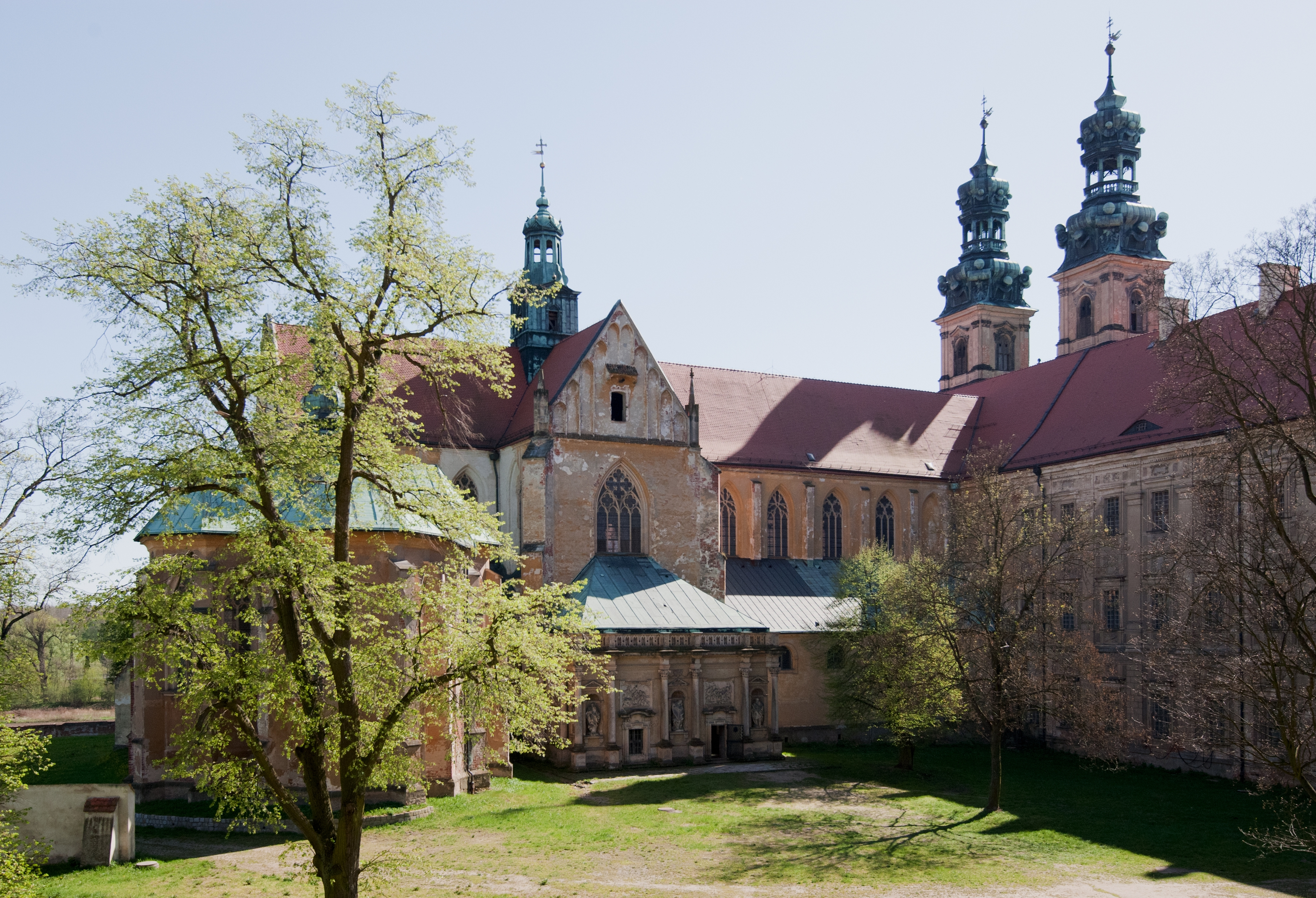 Opactwo cystersów w Lubiążu – widok na dziedziniec i kościół klasztorny